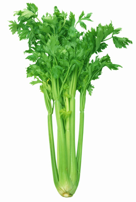 芹菜。